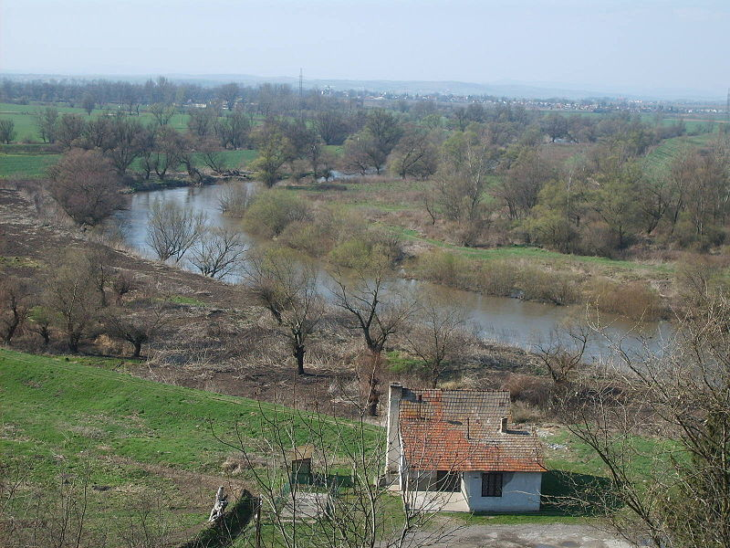 Sajónémetinél látható a Sajó